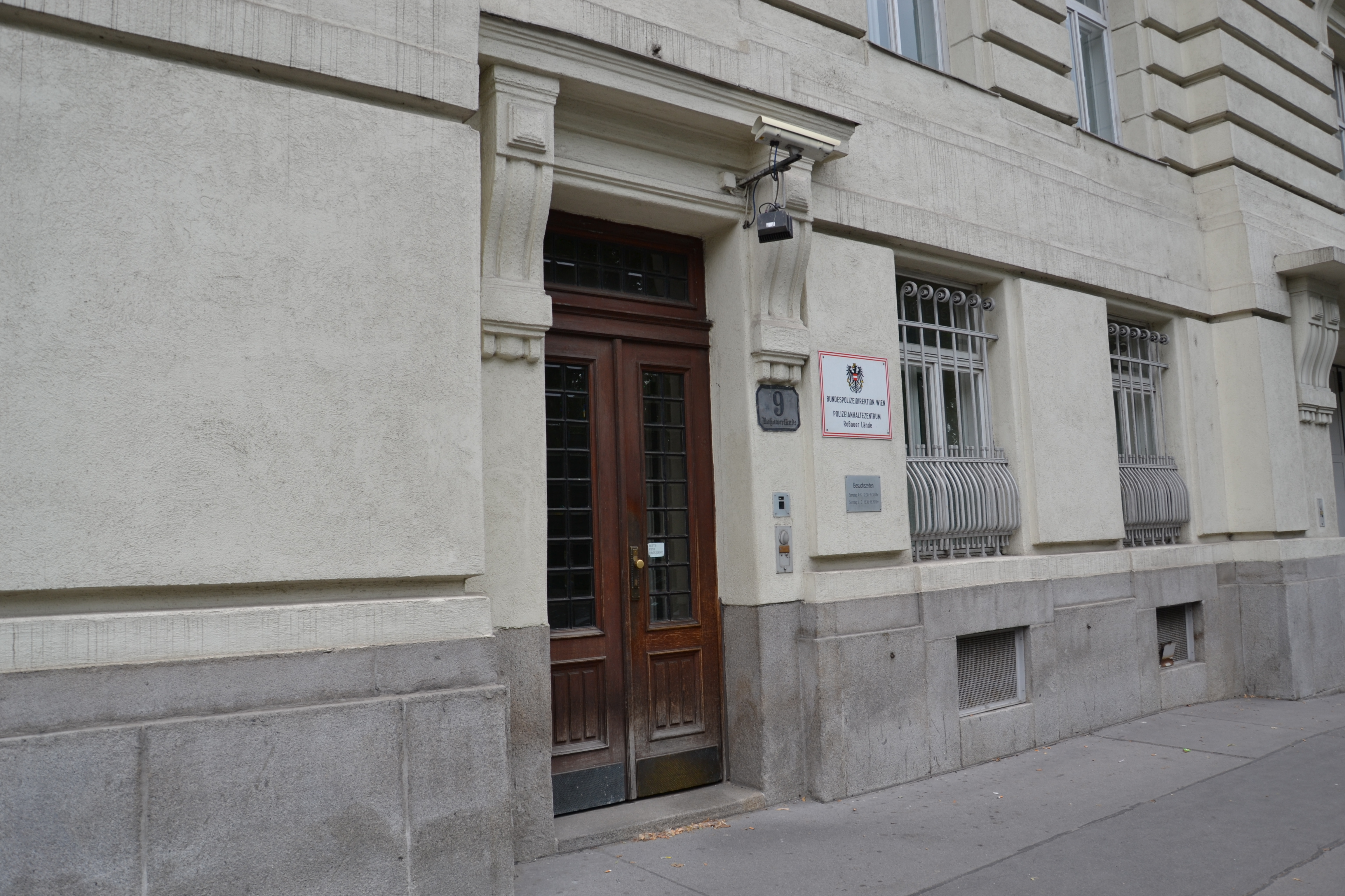 Das Polizeianhaltezentrum (PAZ) Roßauer Lände der Bundespolizeidirektion Wien dient zur Unterbringung von Verwaltungsstrafgefangenen und Schubhäftlingen.